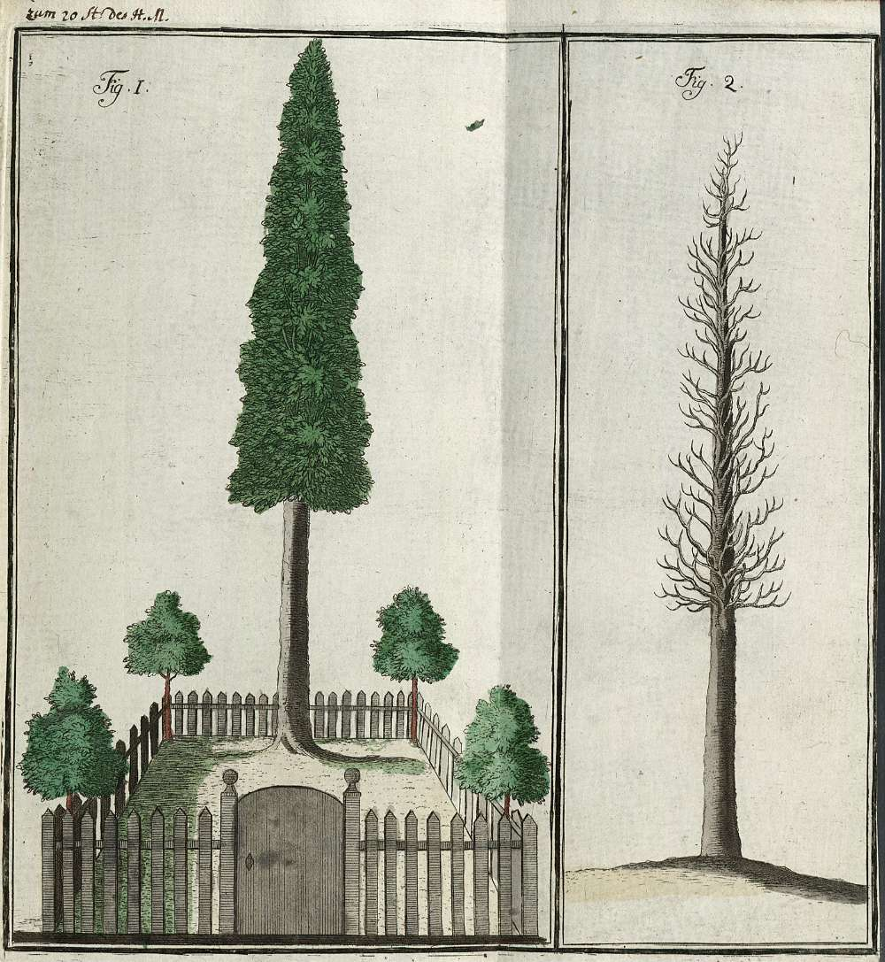 Die Schöne Eiche in Harreshausen. Kolorierter Kupferstich im Hanauischen Magazin